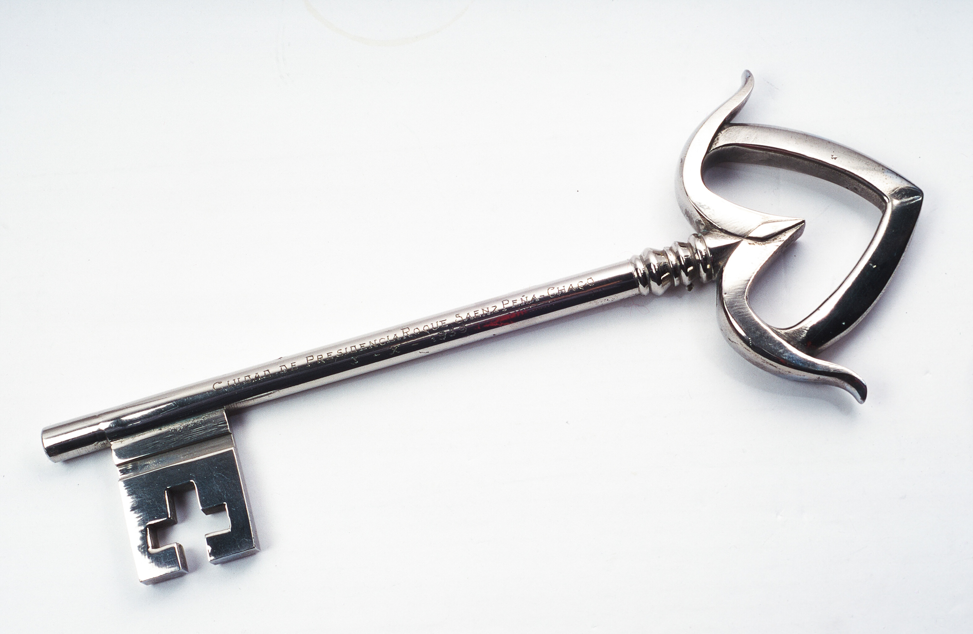 Llave simbólica de la Ciudad Presidencia Roque Sáenz Peña entregada al entonces presidente Arturo Frondizi en oportunidad de ser recibido como huésped de honor en la provincia del Chaco.